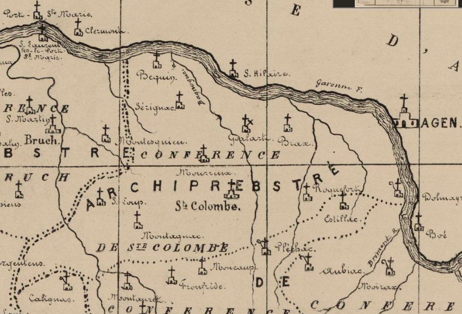 Extrèit de la mapa de la diocèsi de Condòm: Jean-Marie Cazauran (1845-1910). Diocèse de Condom au XVIIe siècle.